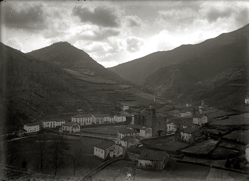 Título original: Vista de la localidad de Lizartza (1/1) Localización: Lizarza (Guipúzcoa)